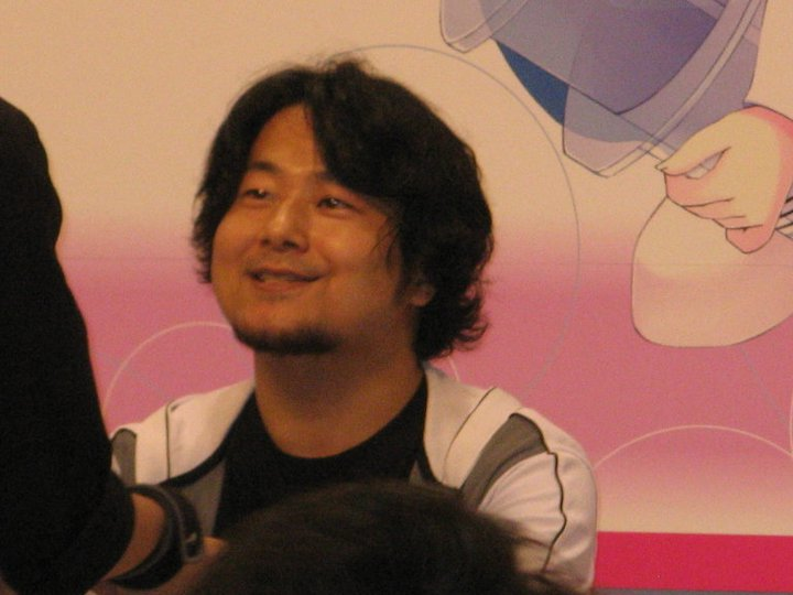 日本輕小說作家水瀨葉月出席2011年香港動漫電玩節簽名會。